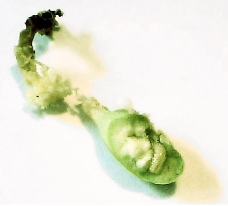 カラスウリの若い実を食害するミバエの幼虫 Unknown